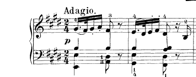 Compassos iniciais do segundo movimento da Sonata Op. 2 n. 3 de Beethoven